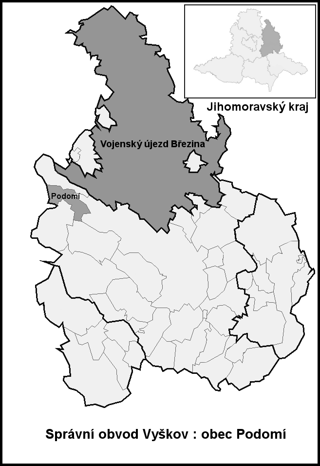 Hranice Podomí (Vyškov- czech republic).